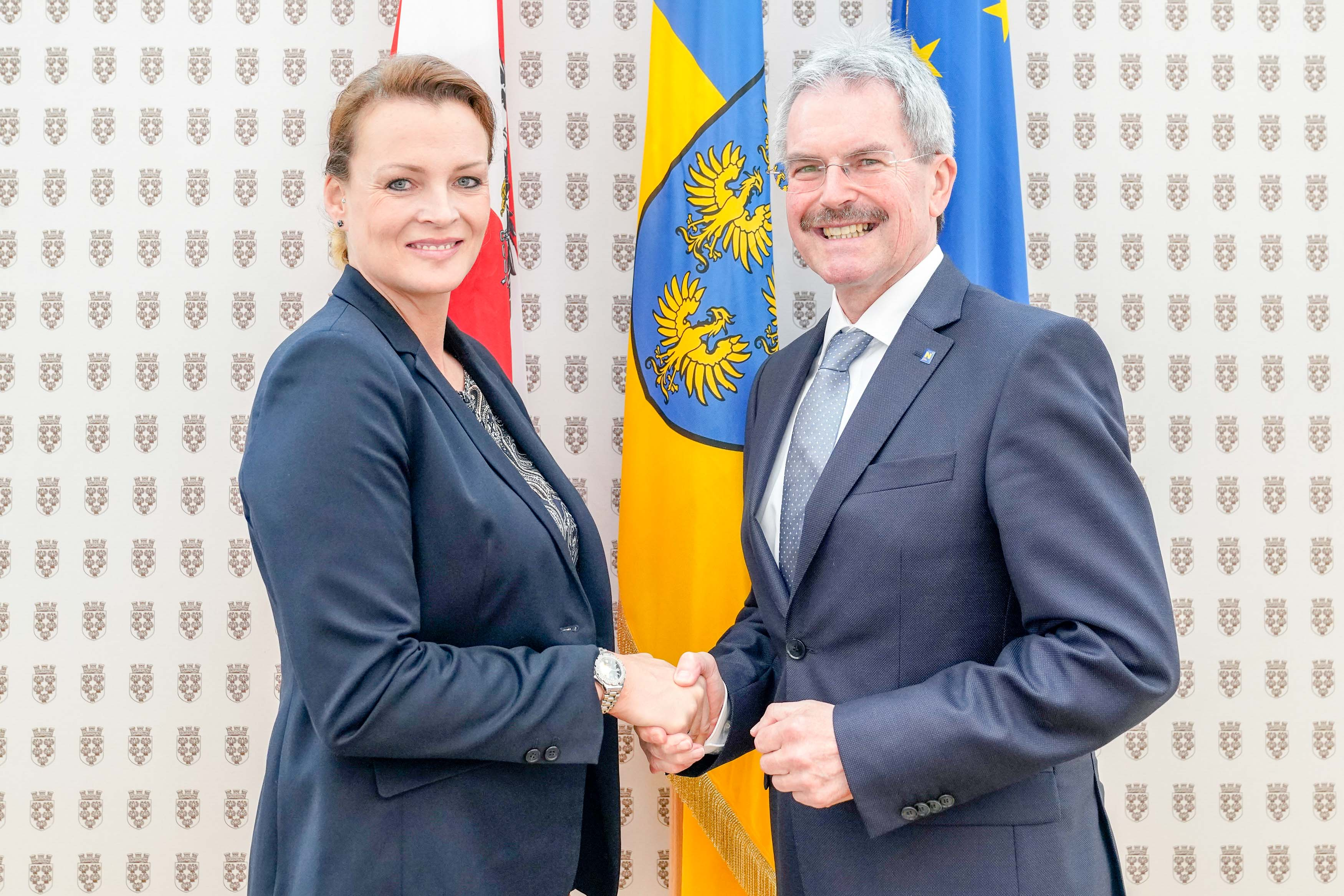 Landtagspräsident Karl Wilfing führt die Konstituierung der Landtags-Ausschüsse durch. Am Foto: Präsident Wilfing gratuliert LAbg Ina Aigner zur Wahl als Obmann des Umwelt-Ausschusses